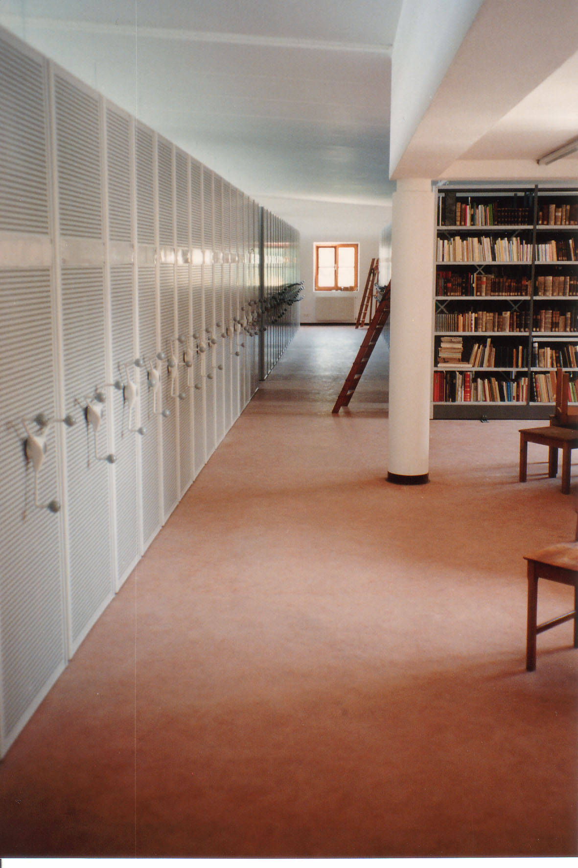 Das Magazin der Bibliothek nach dem Neubau 1994.